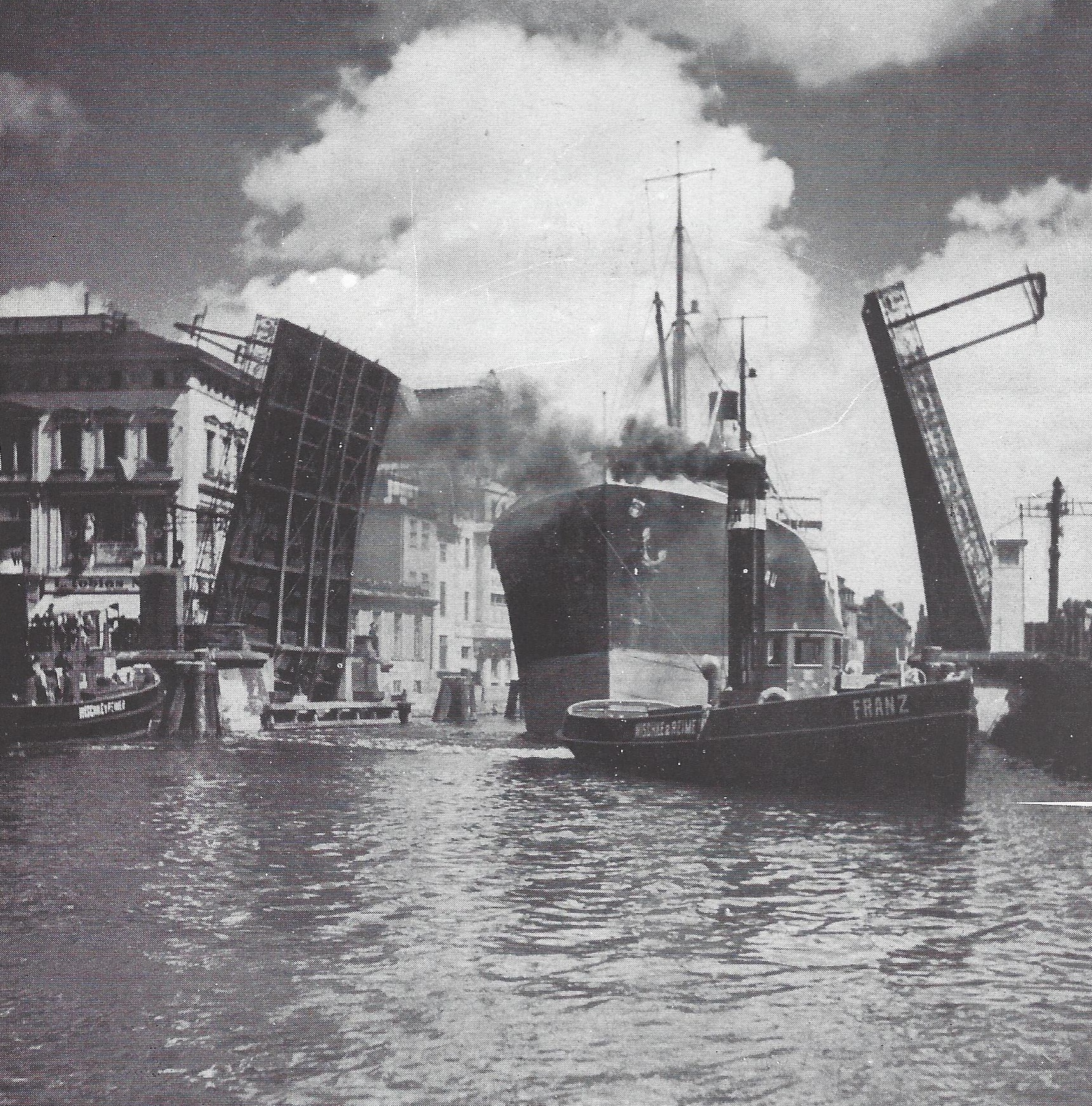 Die geöffnete Krämerbrücke in Königsberg mit Schiff